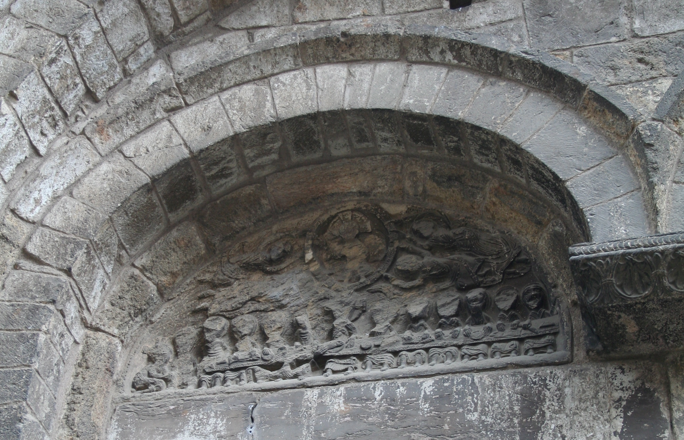 Saint-Pons-de-Thomières (Hérault)- cathédrale - détail du portail : la cène et l'ascension.